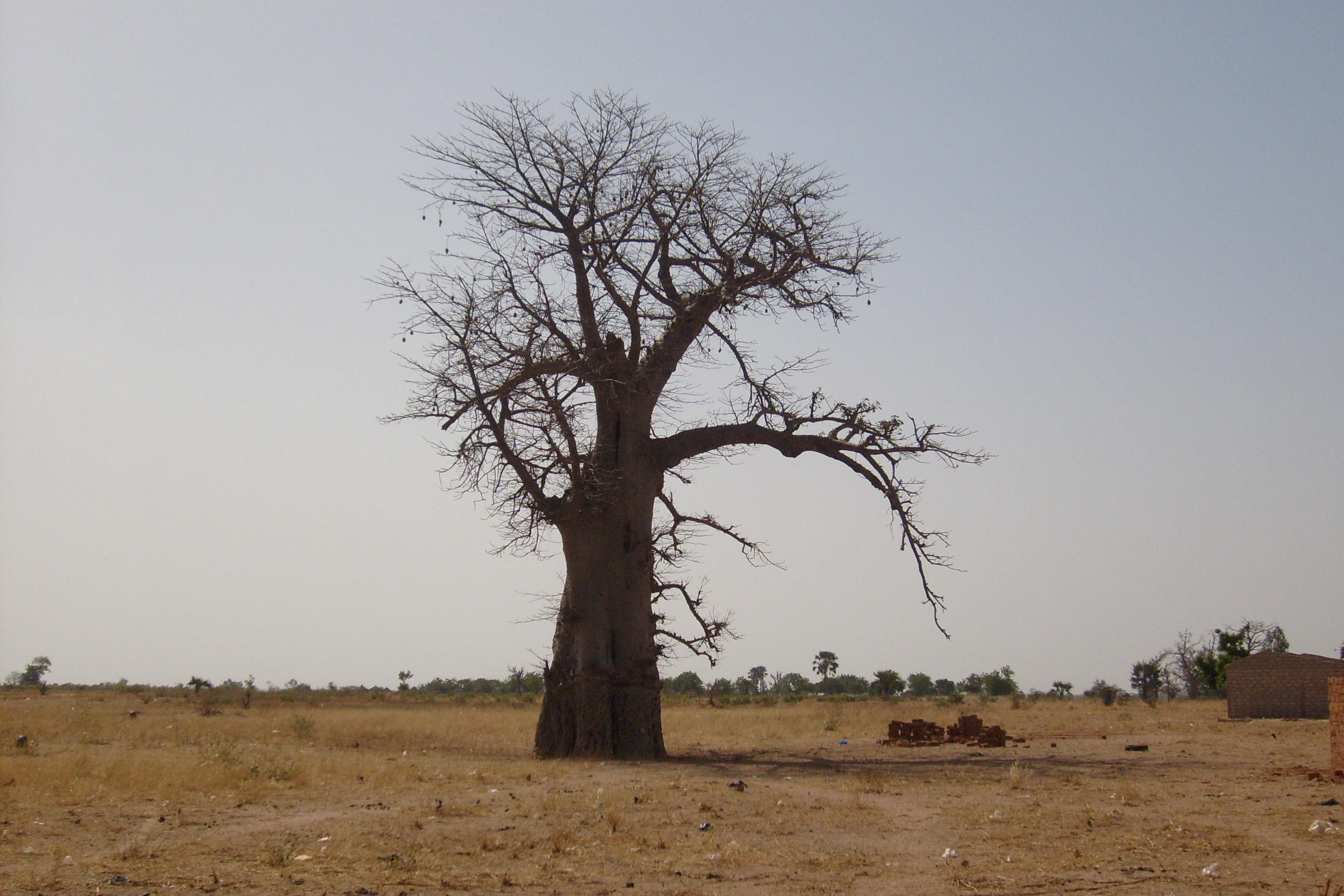 Baobab près de Kaffrine (Sénégal)